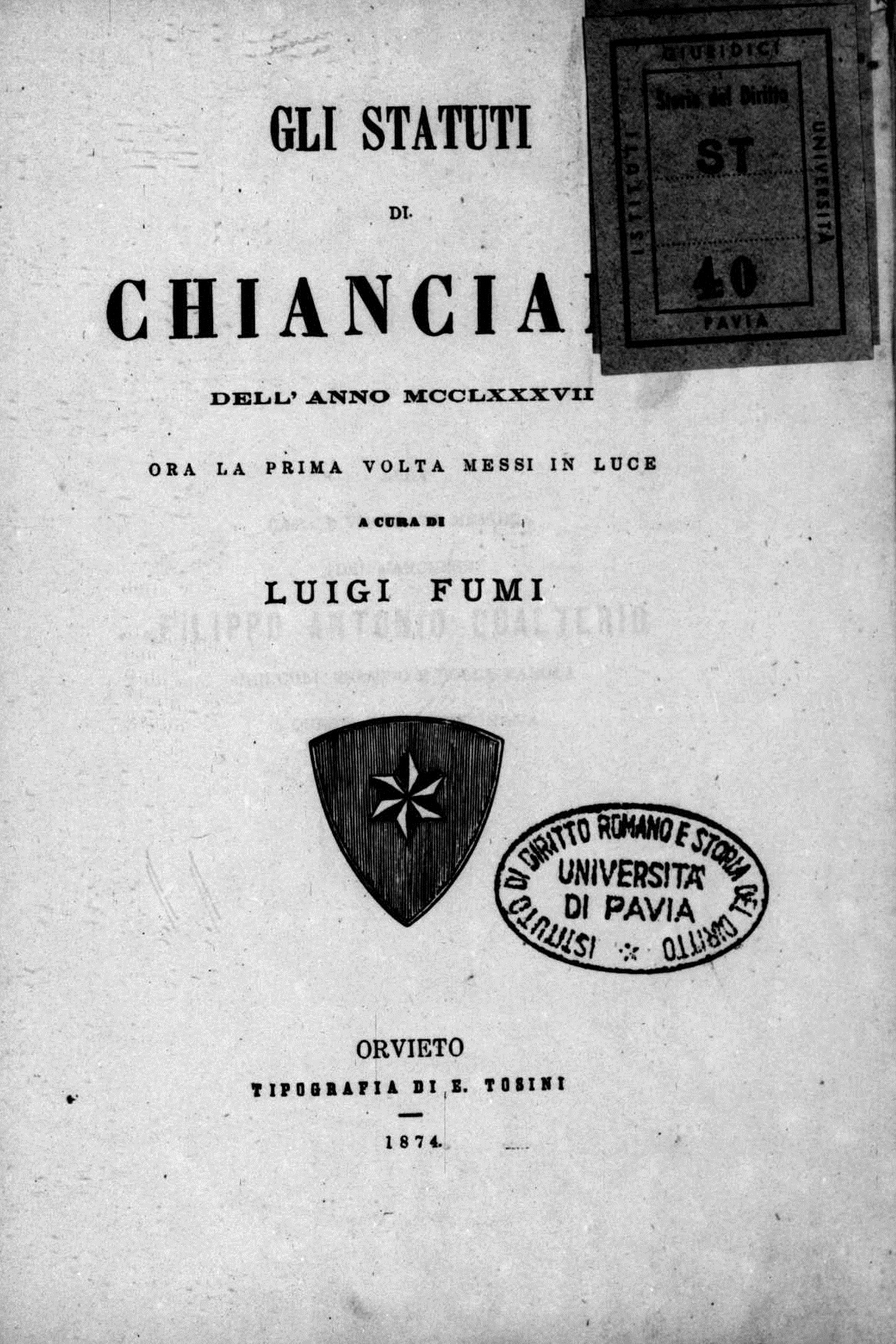 Frontespizio